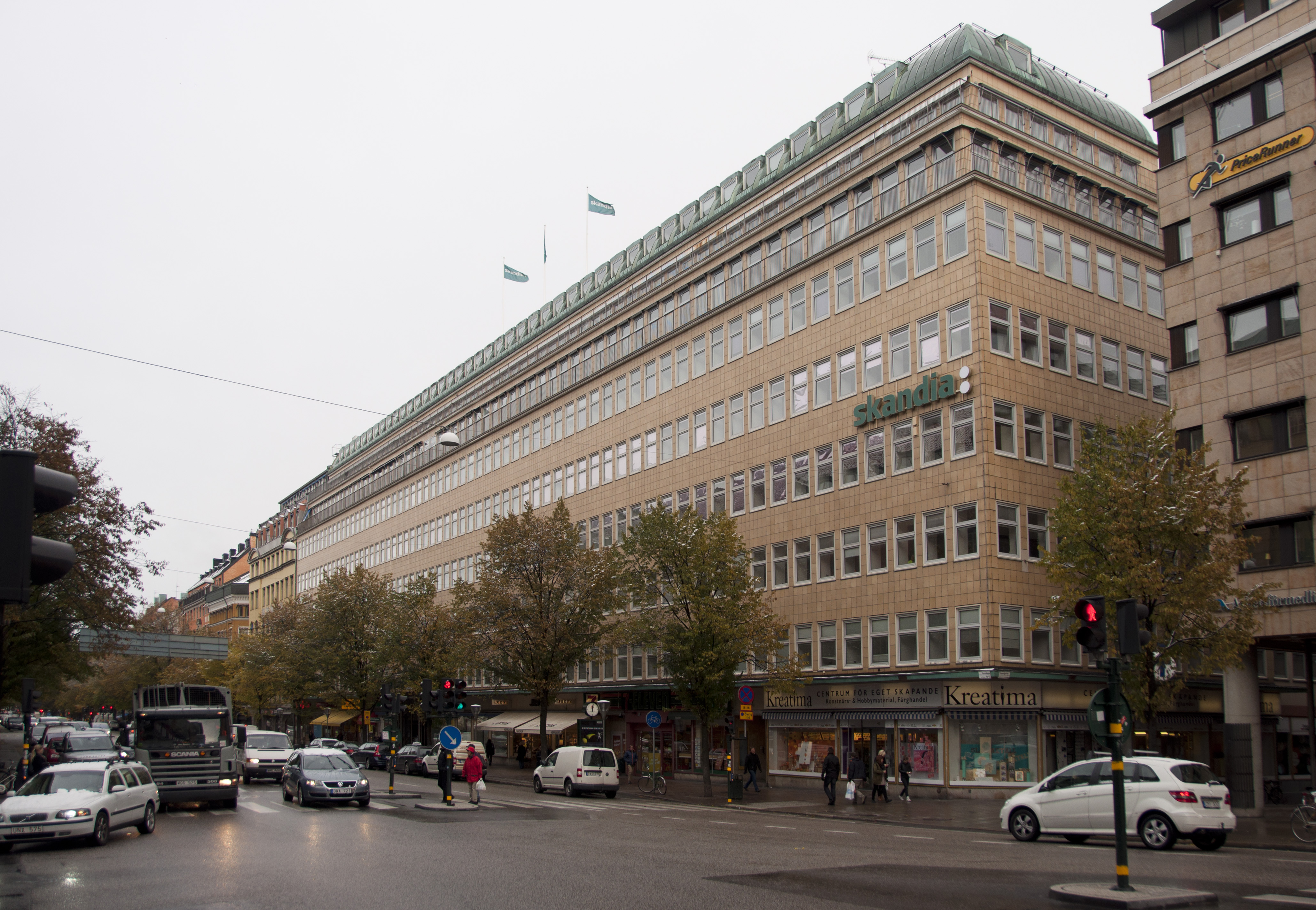 Sveavägen 40-48. Thulehuset. Byggnadsår 1938-42, arkitekt Gustaf Clason, byggherre Thulebolaget.